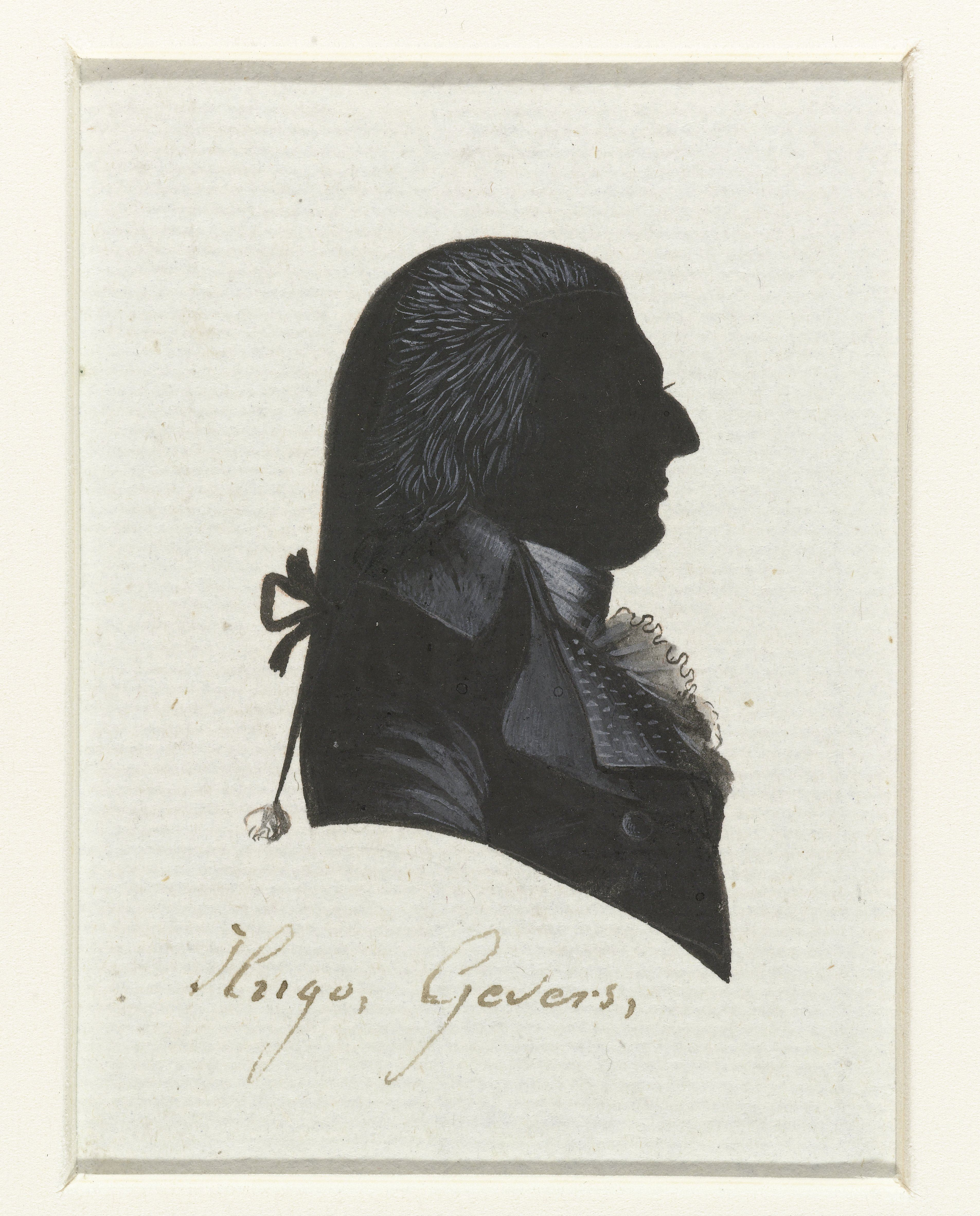 H. Gevers. Tekening in Oost-Indische inkt, waarschijnlijk gemaakt door Hausdorff. De tekening behoort tot een serie van portretten van afgevaardigden naar de Eerste Nationale Vergadering in 1796-1797. Van de serie werden gravures gemaakt die zijn afgedrukt in "Geschiedenis der staatsregeling, voor het Bataafsche volk", een boek van Cornelius Rogge (1799).